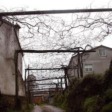 Viñeiras